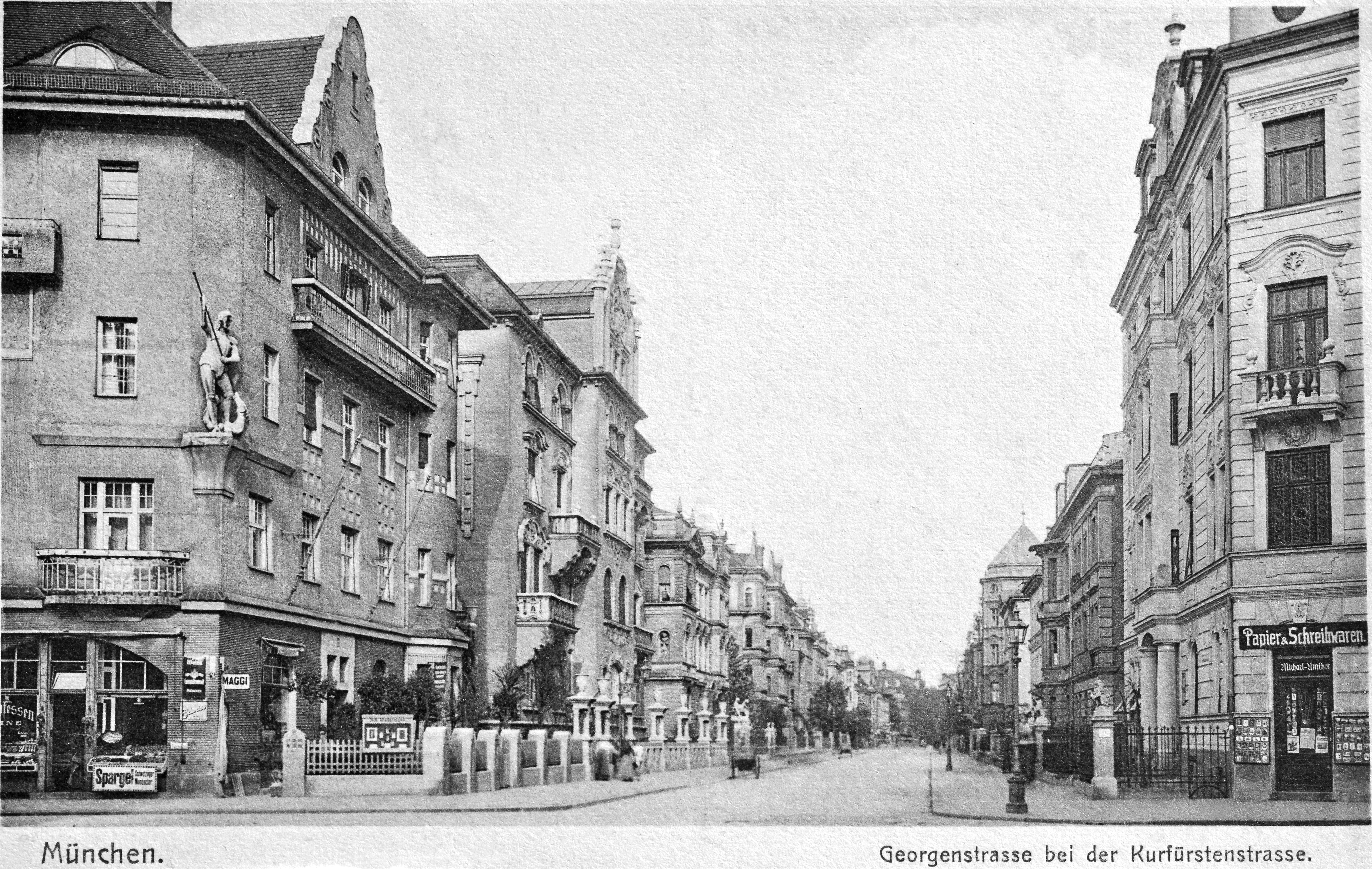 Blick in die Georgenstraße von der Kreuzung an der Kurfürstenstraße.